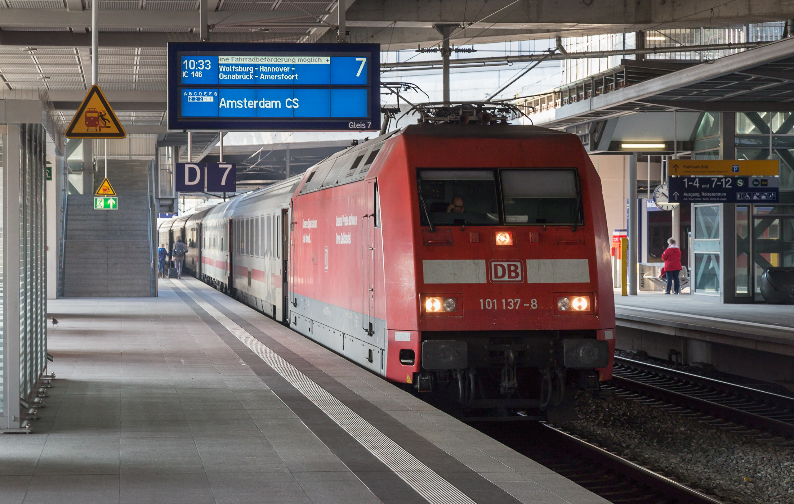 Gleis 7 Bahnhof Berlin-Südkreuz mit dem IC nach Amsterdam Centraal Station